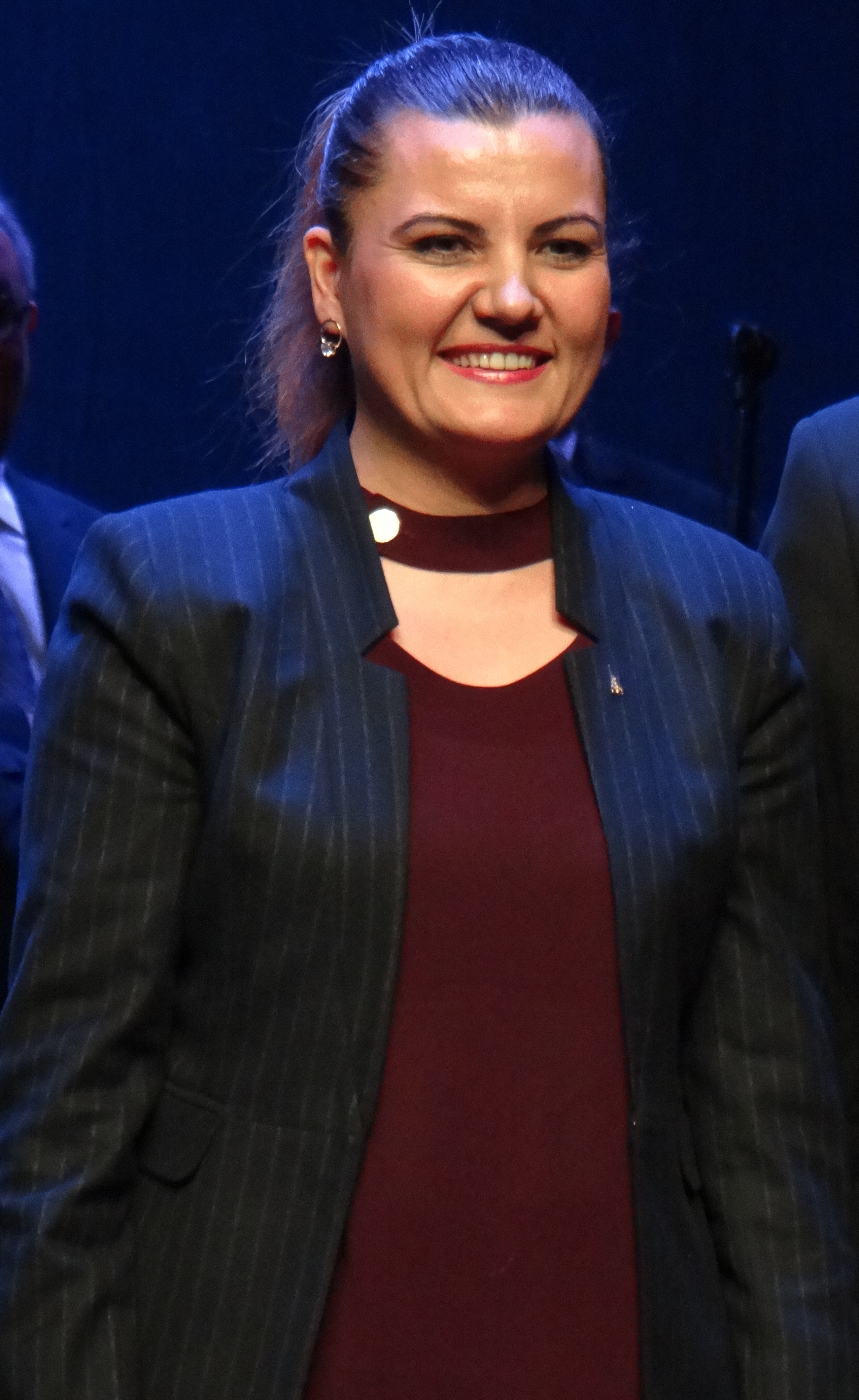 Fatma Kaplan Hürriyet 20180127